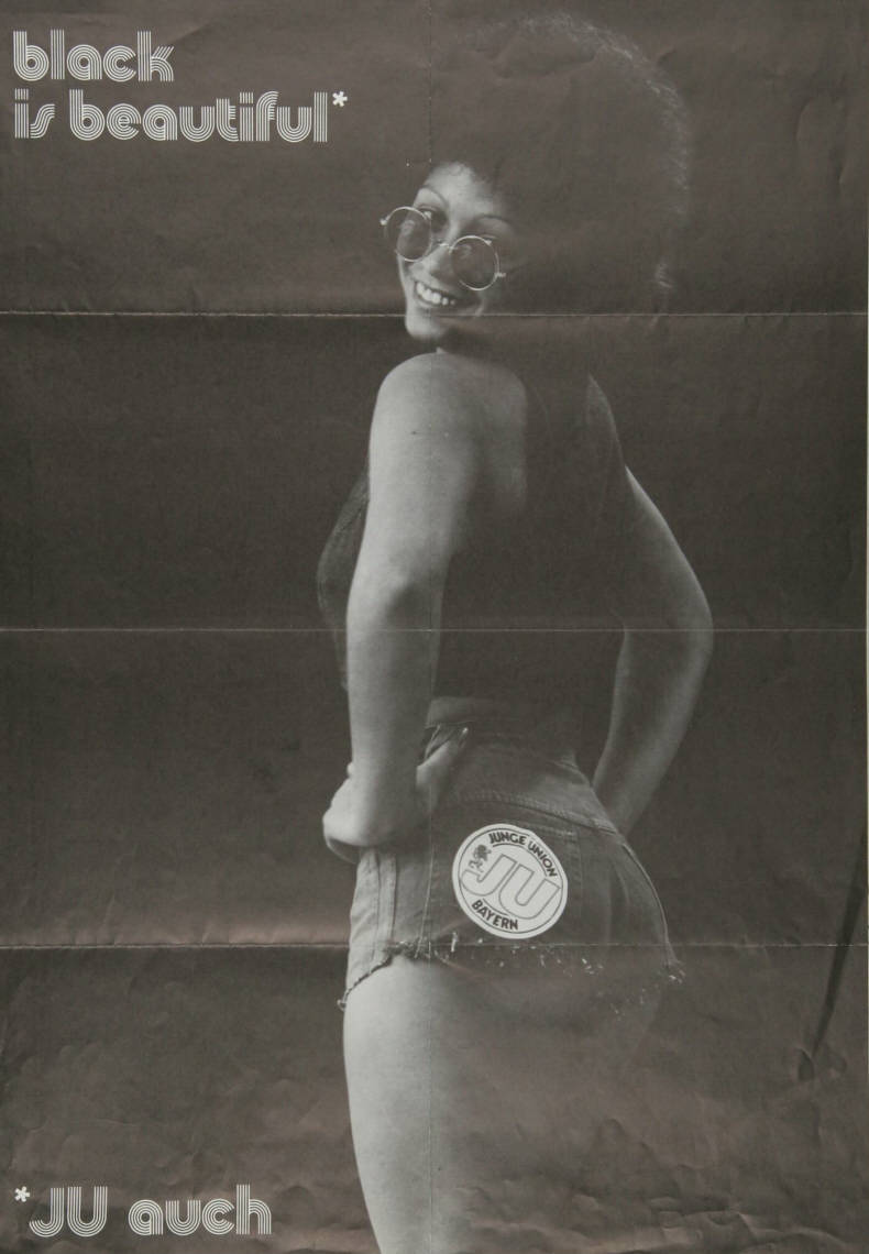 black is beautiful JU auch Abbildung: Junge Farbige in Shorts Kommentar: Rückseitig bebildertes und beschriftetes Plakat der JU, OV Freising Plakatart: Motiv-/Textplakat Künstler_Grafiker: Fotos: Lehmann, Freising; Flöter, München Auftraggeber: JU, OV Freising Drucker_Druckart_Druckort: Kommunikations-Werkstatt, Freising Objekt-Signatur: 10-001: 1877 Bestand: Plakate zu Bundestagswahlen (10-001) GliederungBestand10-18: Plakate zu Bundestagswahlen (10-001) » Die 8. Bundestagswahl am 3. Oktober 1976 » Motivplakate Lizenz: KAS/ACDP 10-001: 1877 CC-BY-SA 3.0 DE